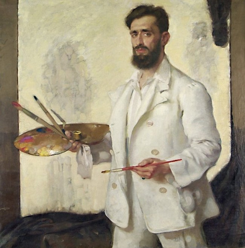 Gino Parin (1876-1944), Autoportrait